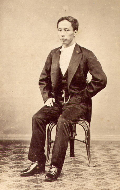 Tadasu Hayashi, c.1873.